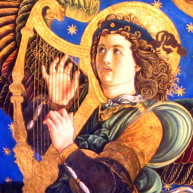 Àngel music de la Seu (València)